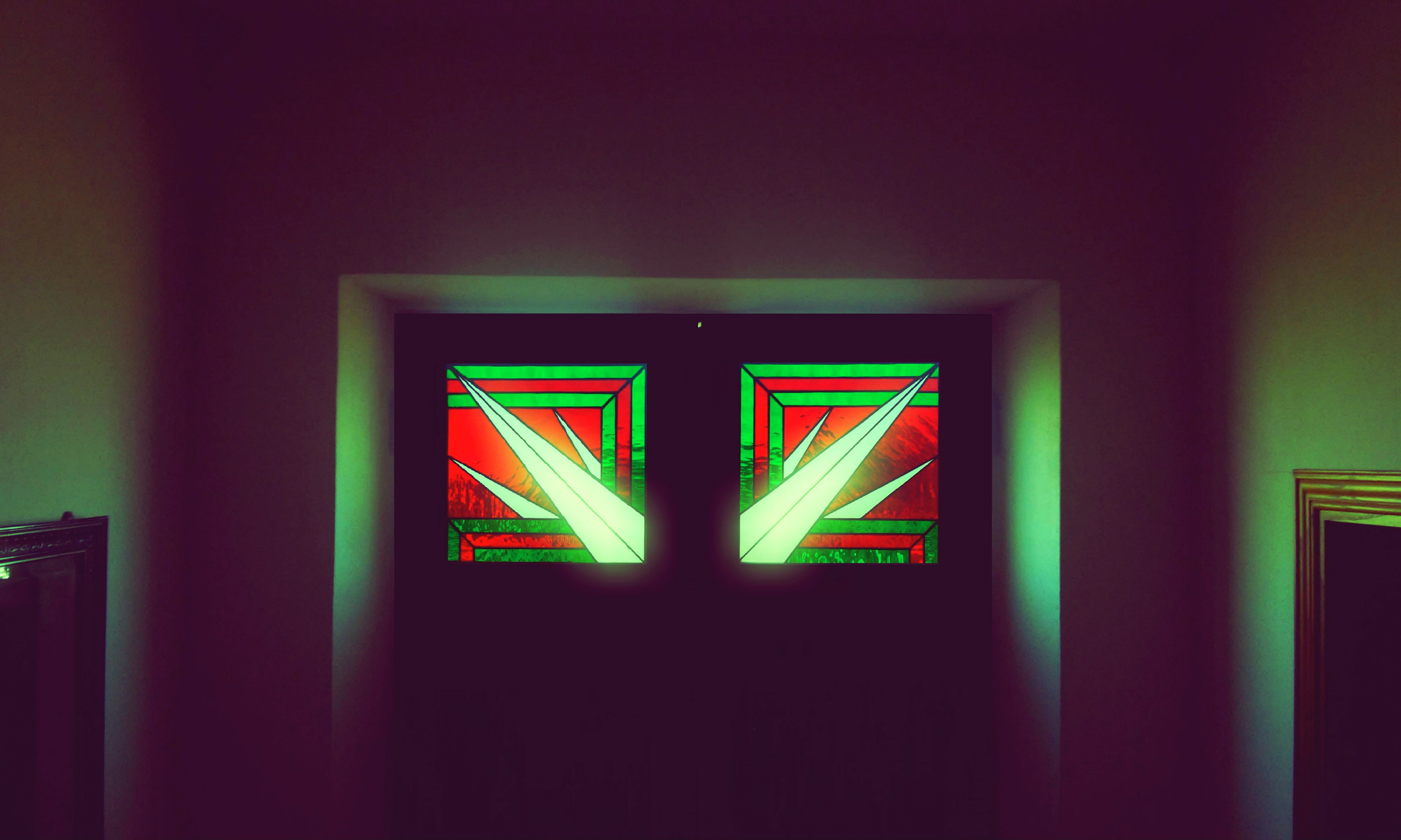 Arnaldo Dell'Ira (1903-1943). Due vetrate futuriste, c. 1930, Lucca,collezione privata.